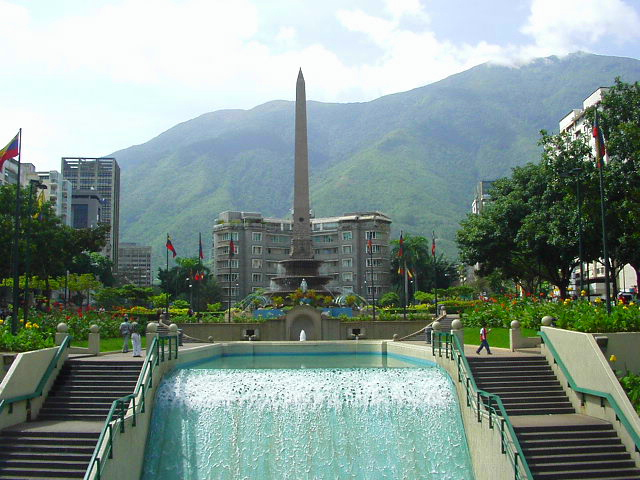 Plaza Francia of Altamira, Chacao Municipality , Miranda State, Venezuela.